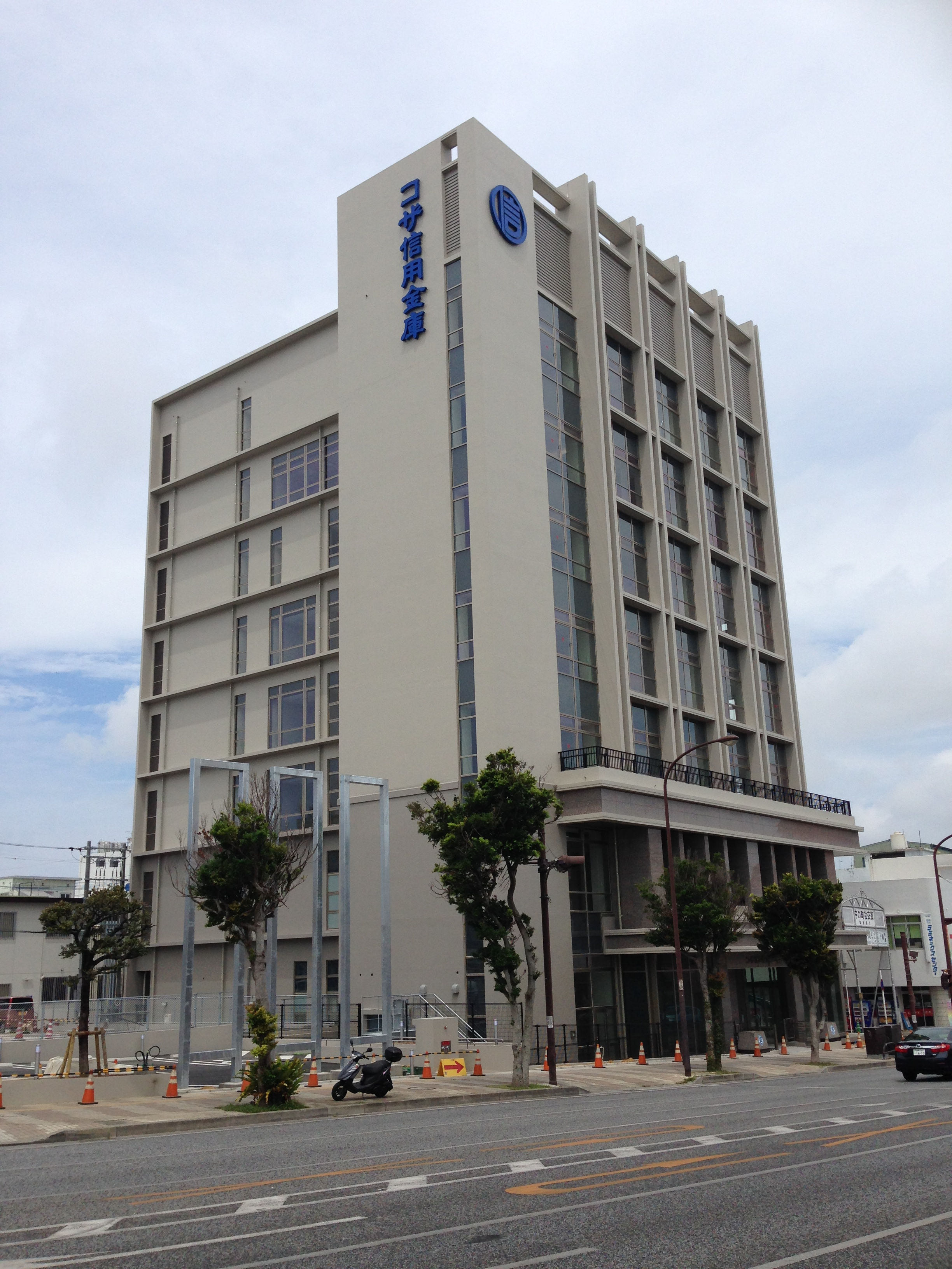 2015年4月竣工時に撮影